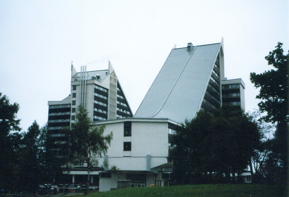 Das Hotel Panorama in Oberhof wurde in den 60er-Jahren erbaut. Fotografiert von Michael Sander